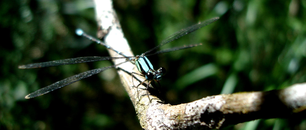 Exemplar de Heteragrion cyane, Mata do Baú, Barroso, Minas Gerais, 2010. Para explicação sobre a identificação, ver (2014-07-03). "A remarkable new species of Heteragrion from Brazil (Odonata: Megapodagrionidae)". International Journal of Odonatology 17 (2-3): 95–99. ISSN 2159-6719 1388-7890, 2159-6719. Retrieved on 2020-05-05.